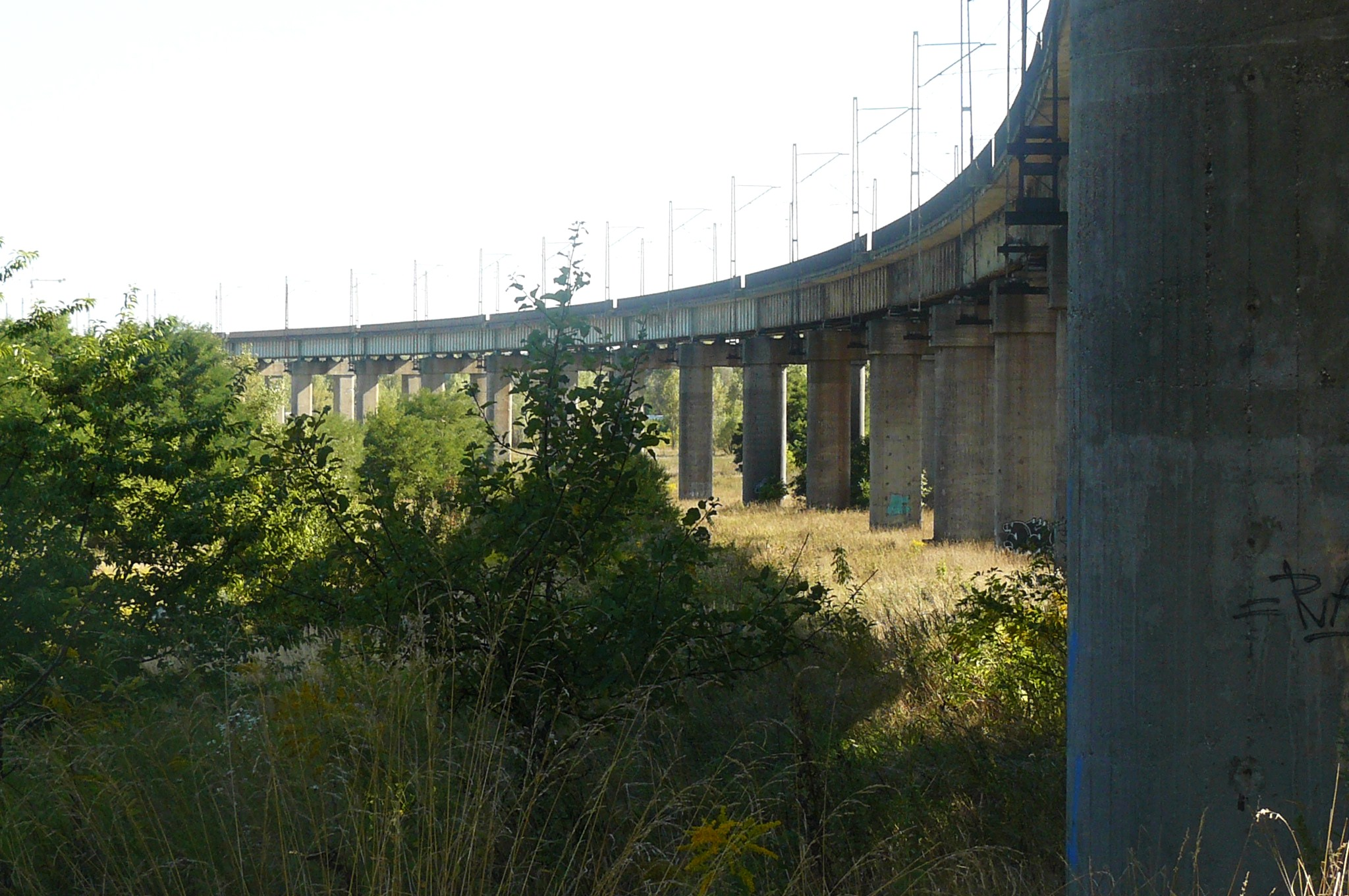 Północna obwodnica kolejowa Poznania w rejonie ul. Rubież.